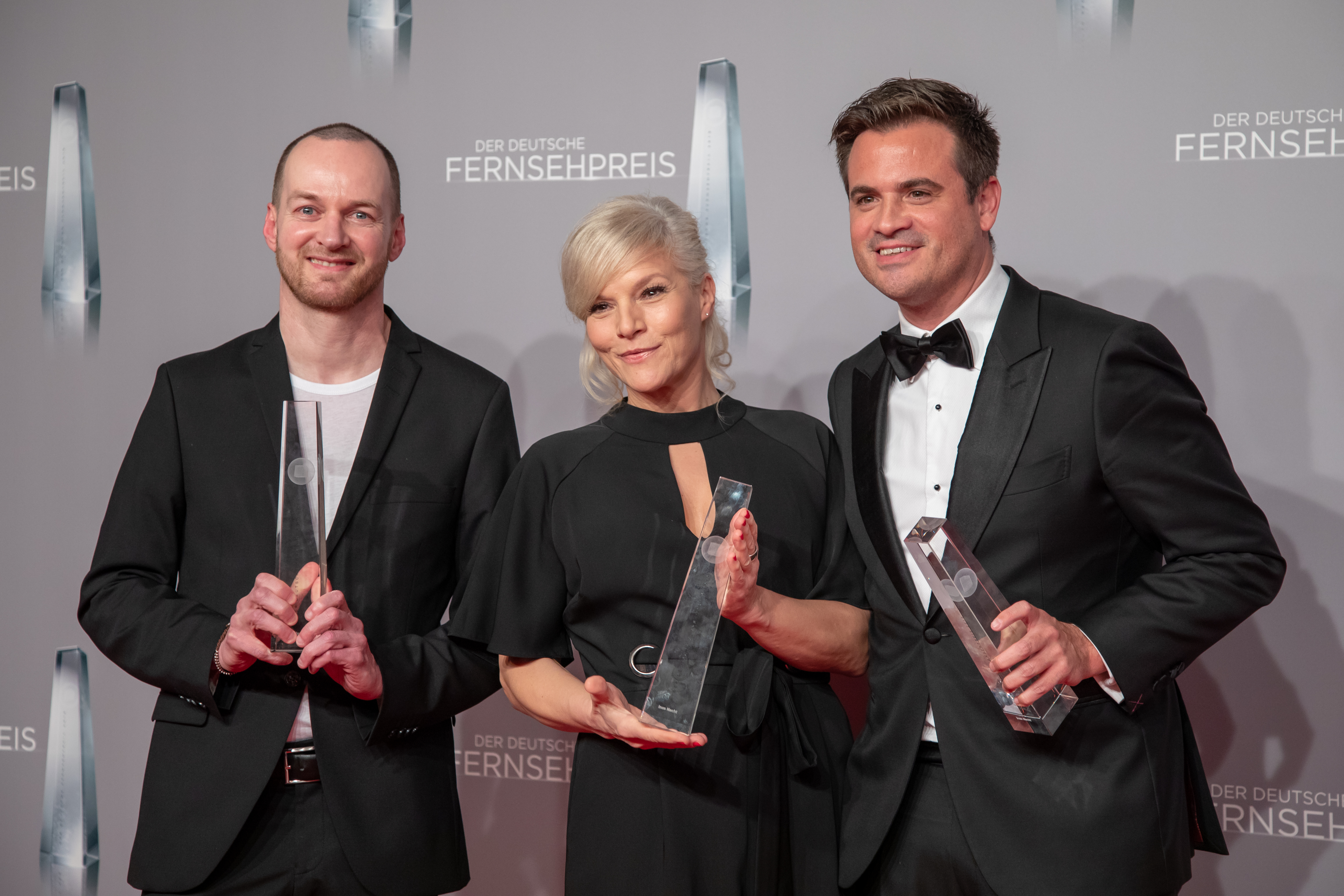 Inas Nacht beim Deutschen Fernsehpreis 2019 in der Düsseldorfer Rheinterrasse